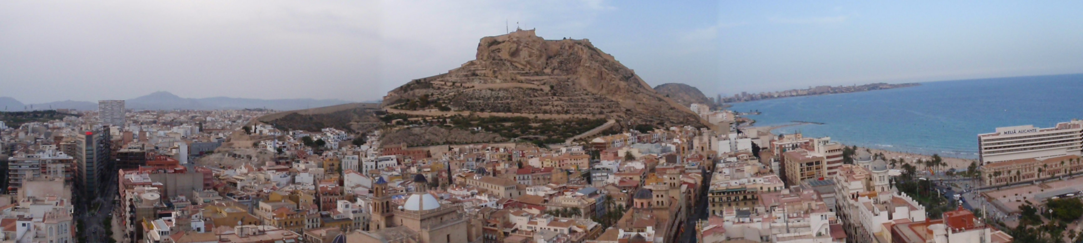 Alicante. Vista panorámica.